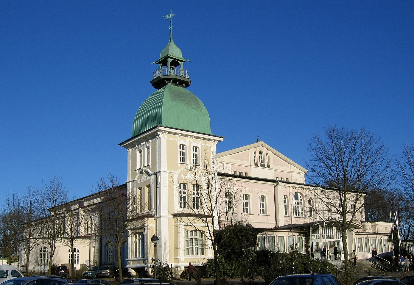 Schützenhalle in Lüdenscheid. Erbaut 1899/1900.